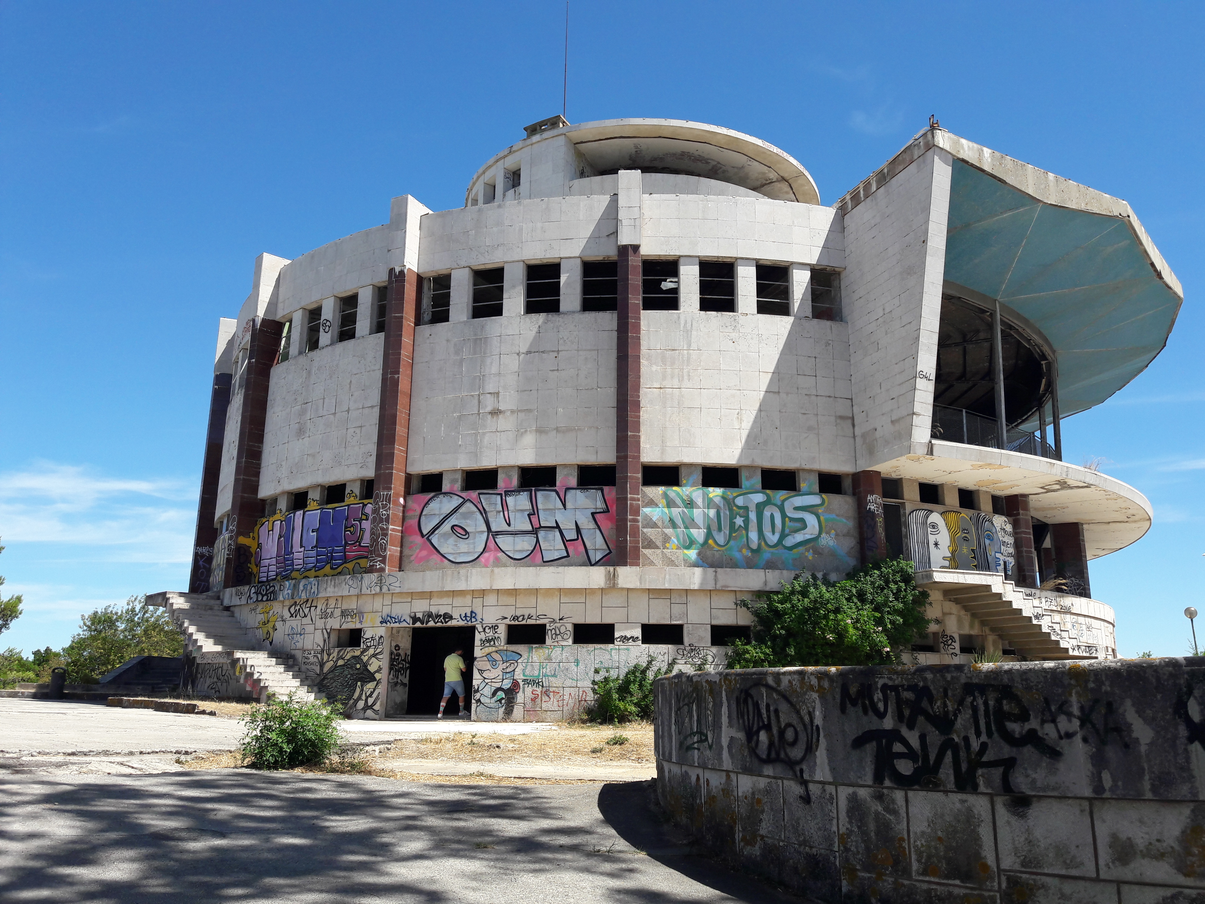 Antigo Restaurante Panorâmico de Monsanto, Lisboa.